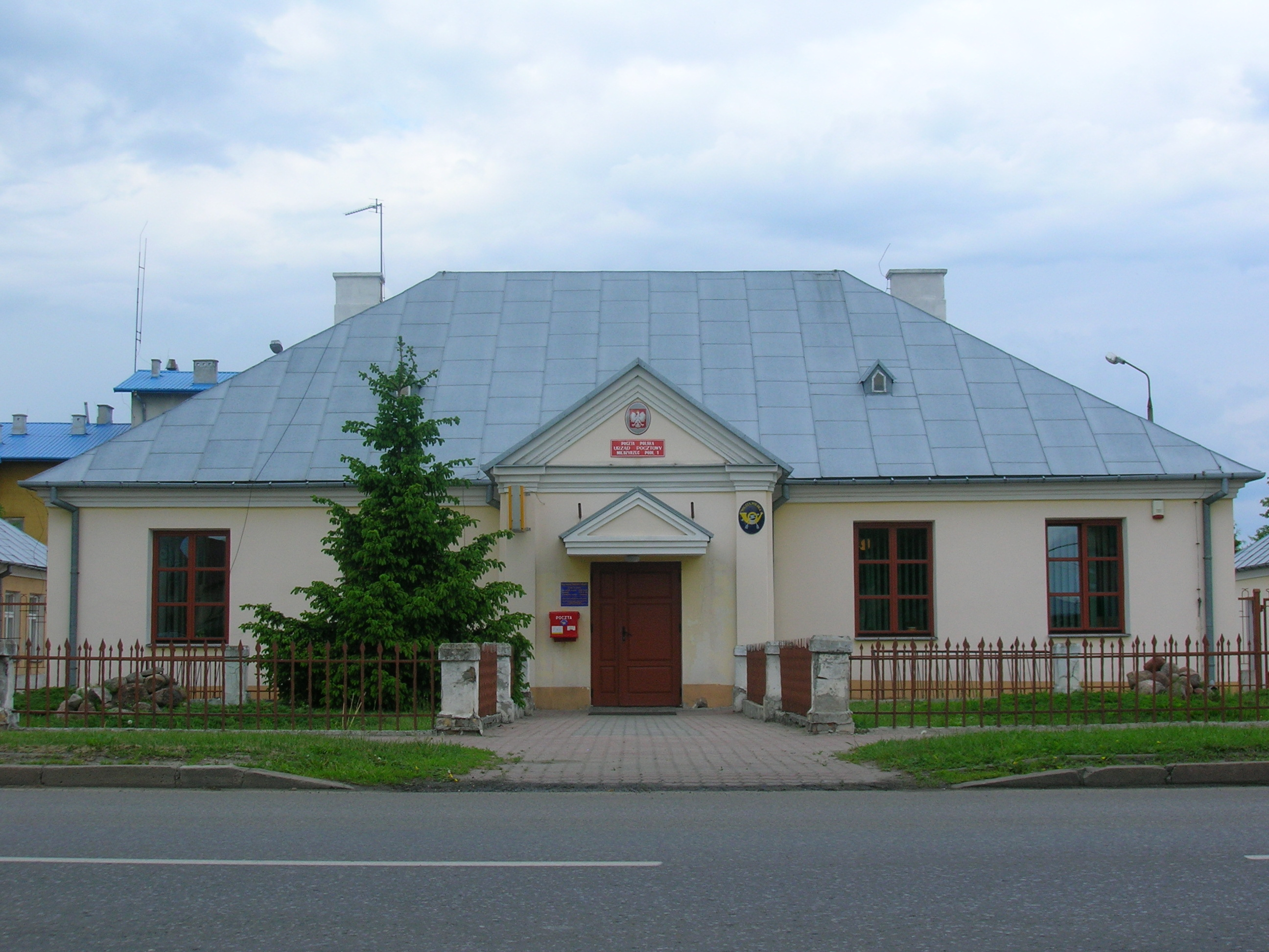 Międzyrzec Podlaski. Zespół dawnej poczty konnej – ul. Warszawska.